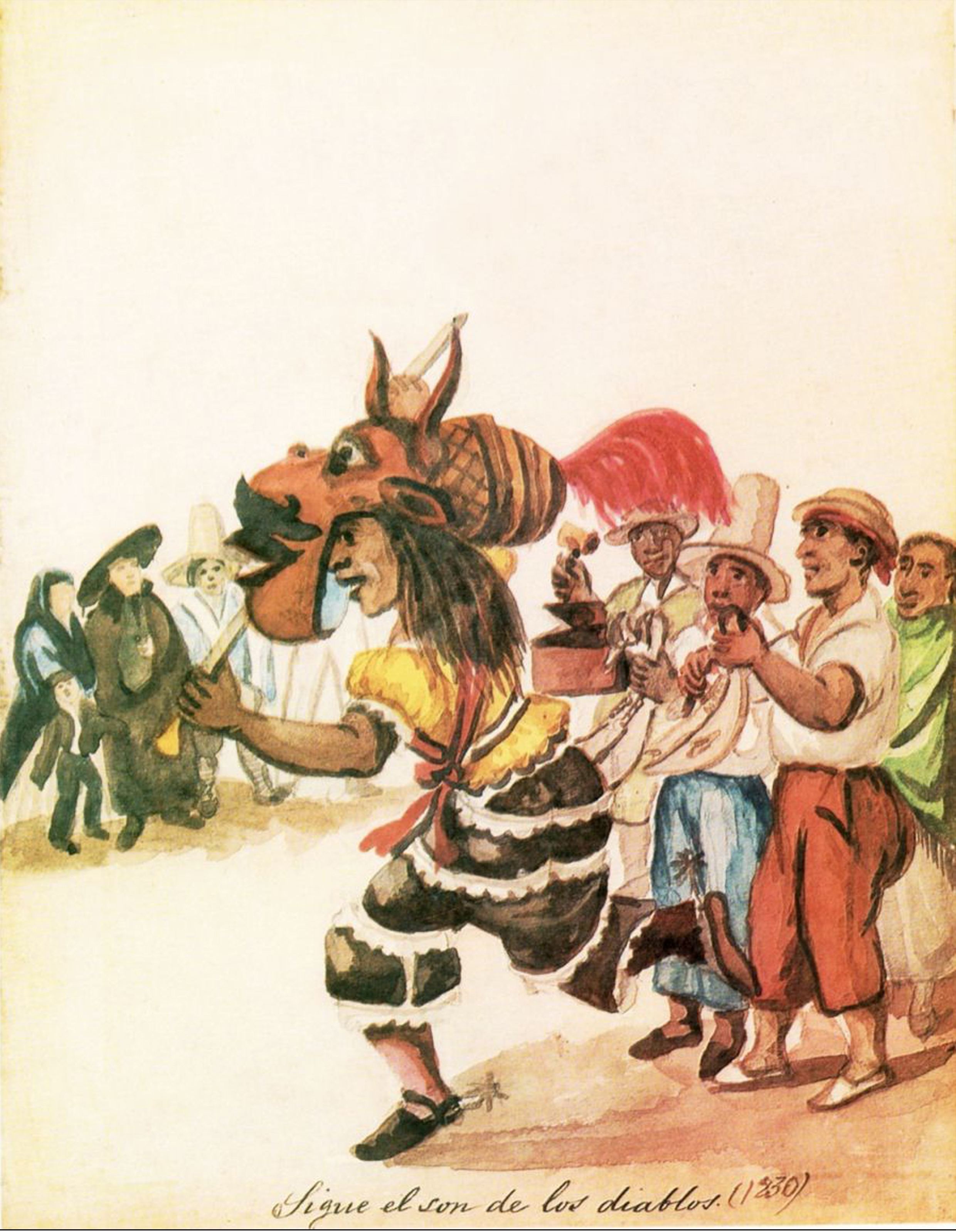 Acuarela de Pancho Fierro (Lima, 1807 - Lima, 1879)